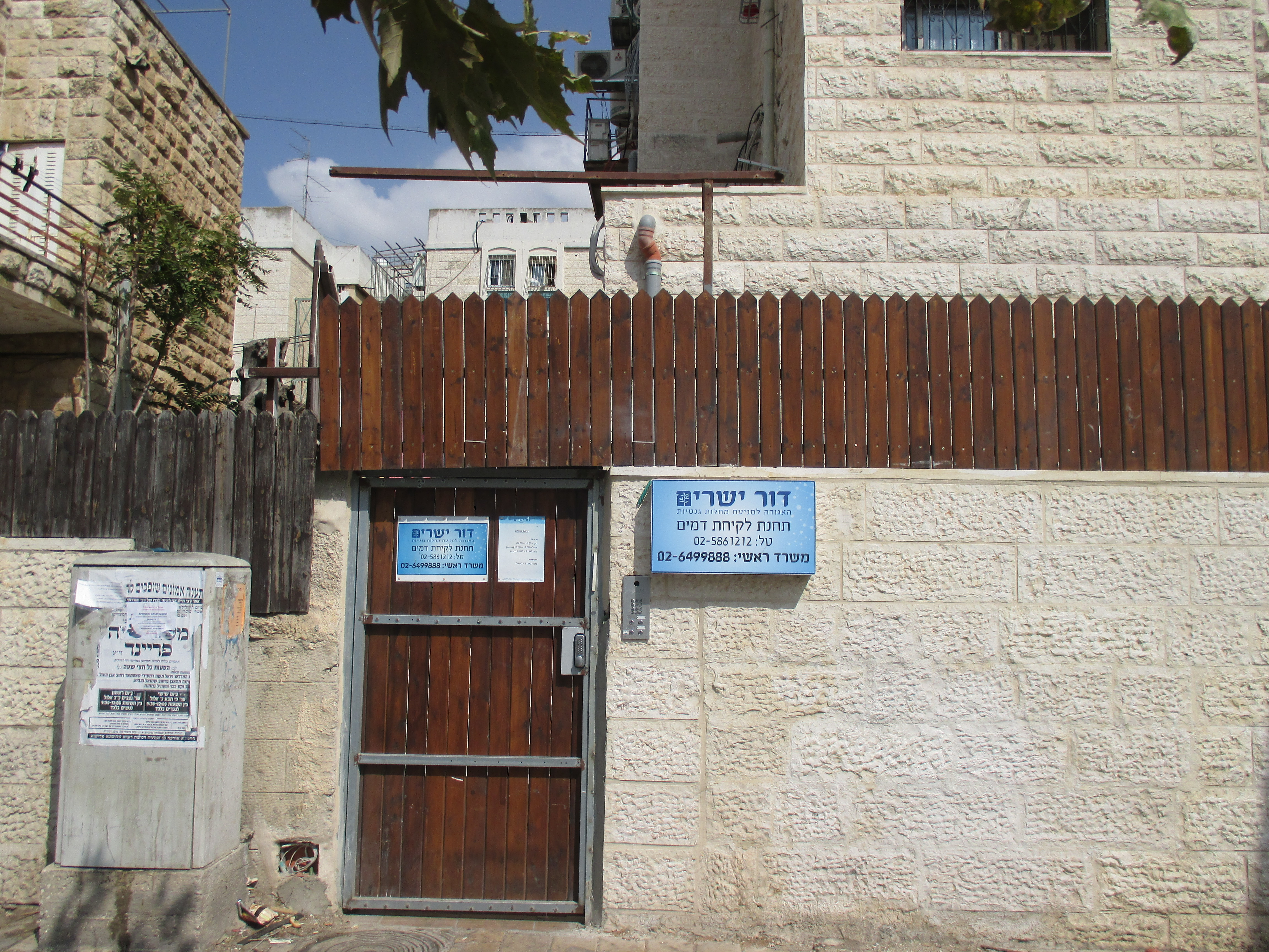 משרדי האגודה בירושלים